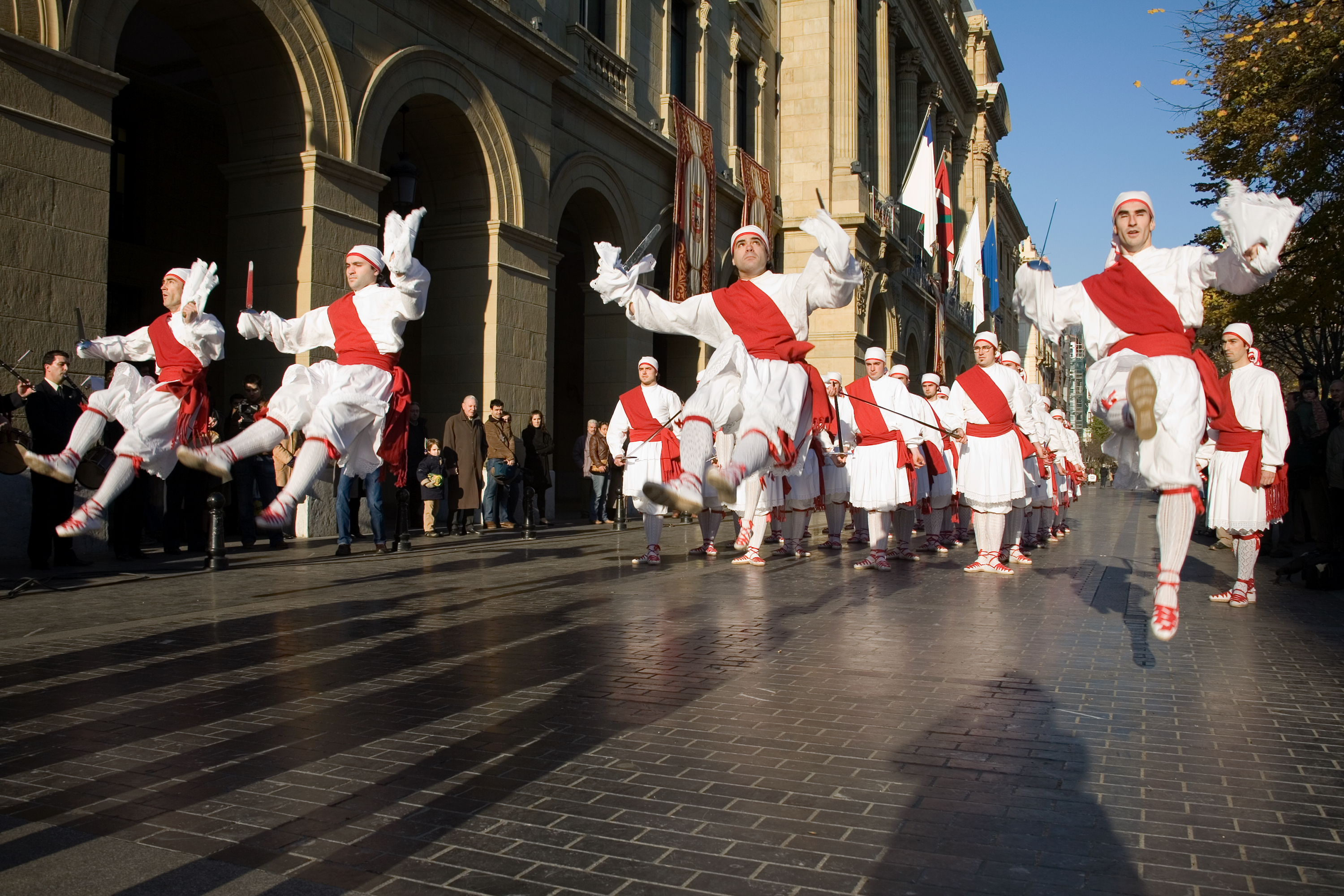 Basque Dancers